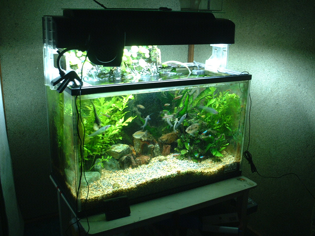 aquarium用60cm標準規格水槽 60cm*30cm*45cm